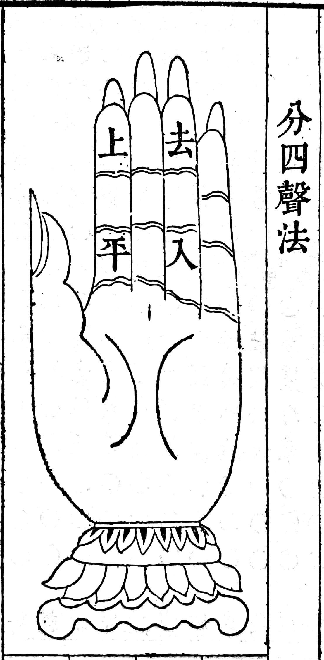 康熙字典第四頁（同文書局原版）